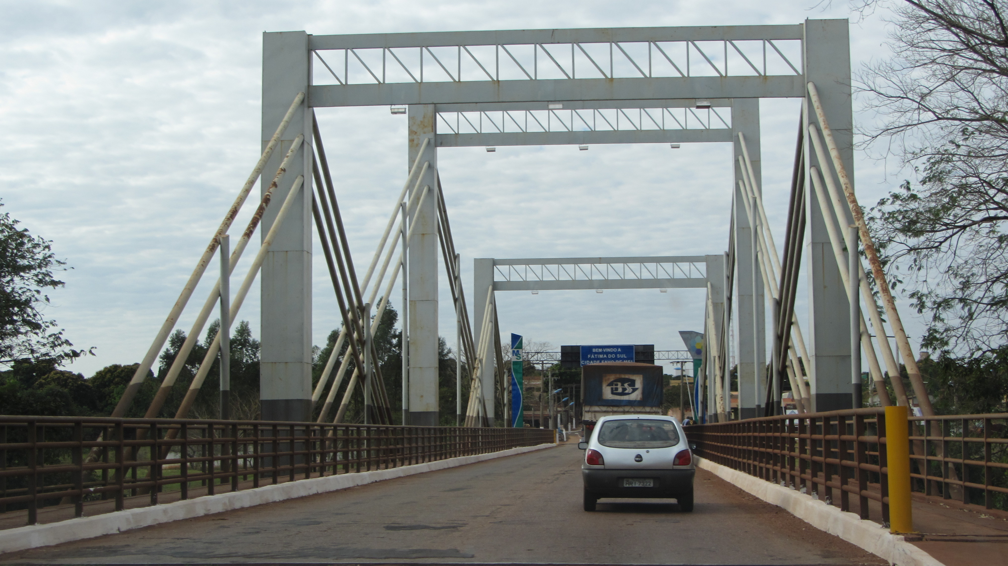 Ponte de Fatima do Sul, MS